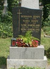 Heinz Haberland-Wiener Zentralfriedhof (63-23-47)